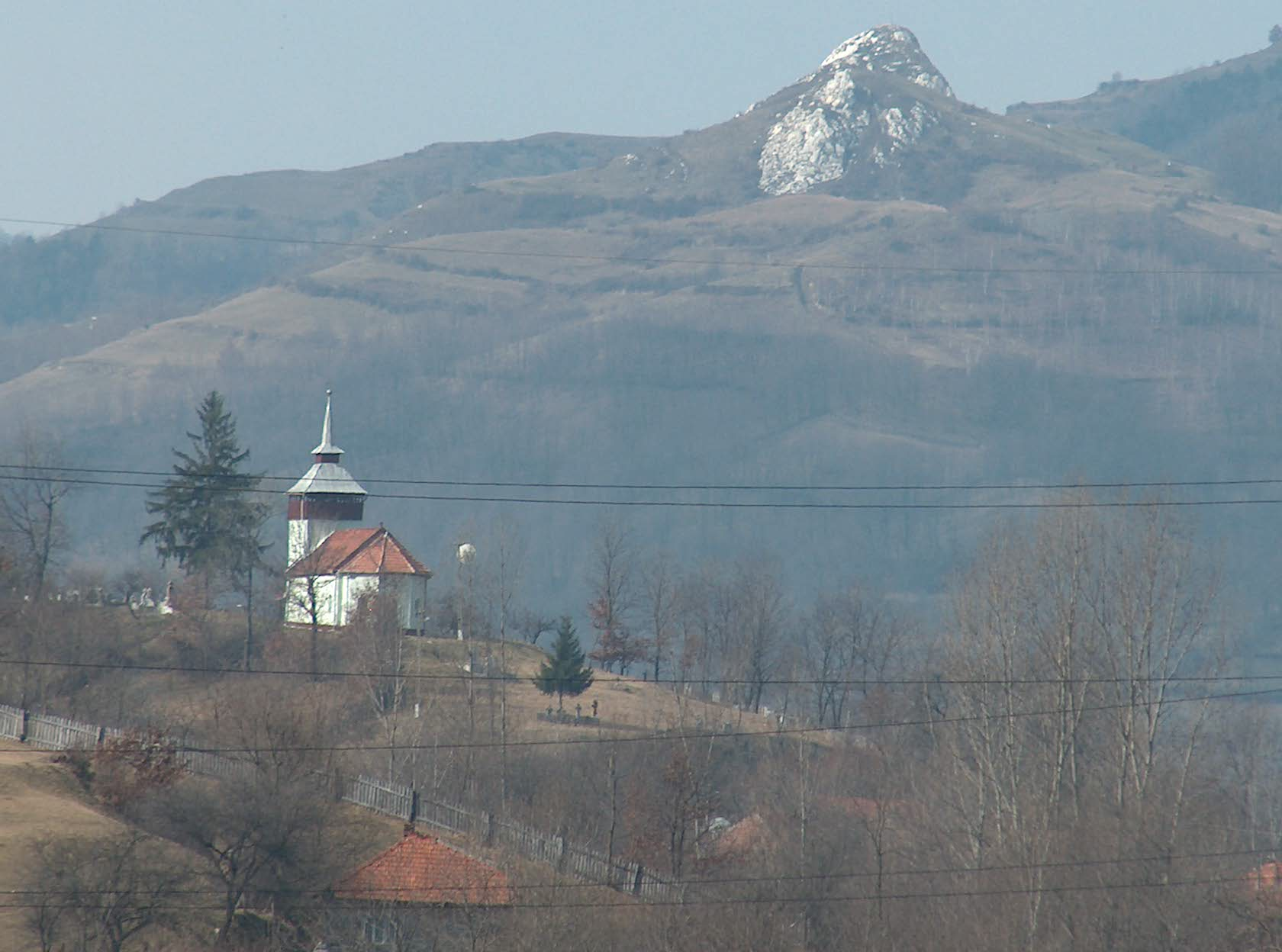 Biserica din Presaca Ampoiului, com. Meteș, jud. Alba. Cod 517454